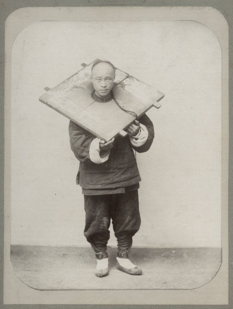 Chinese criminal Cangue